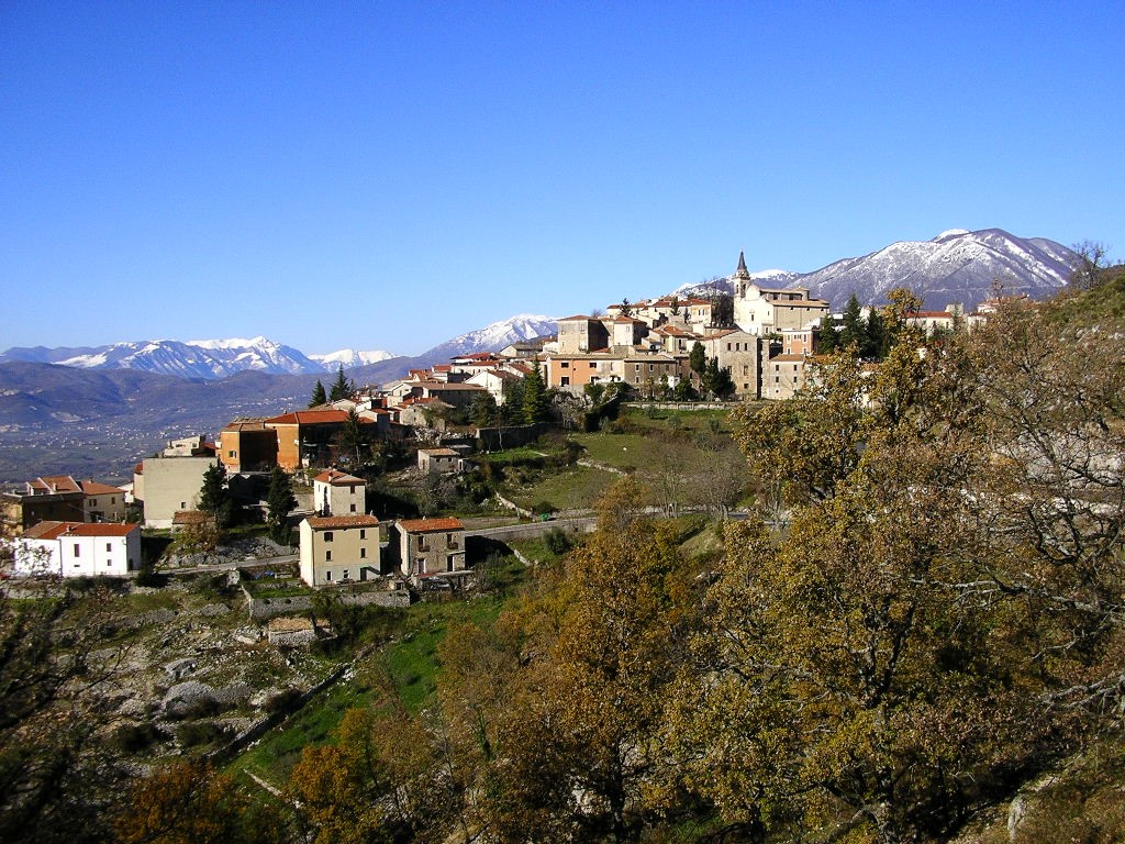 Panorama di Settefrati (FR) Italy